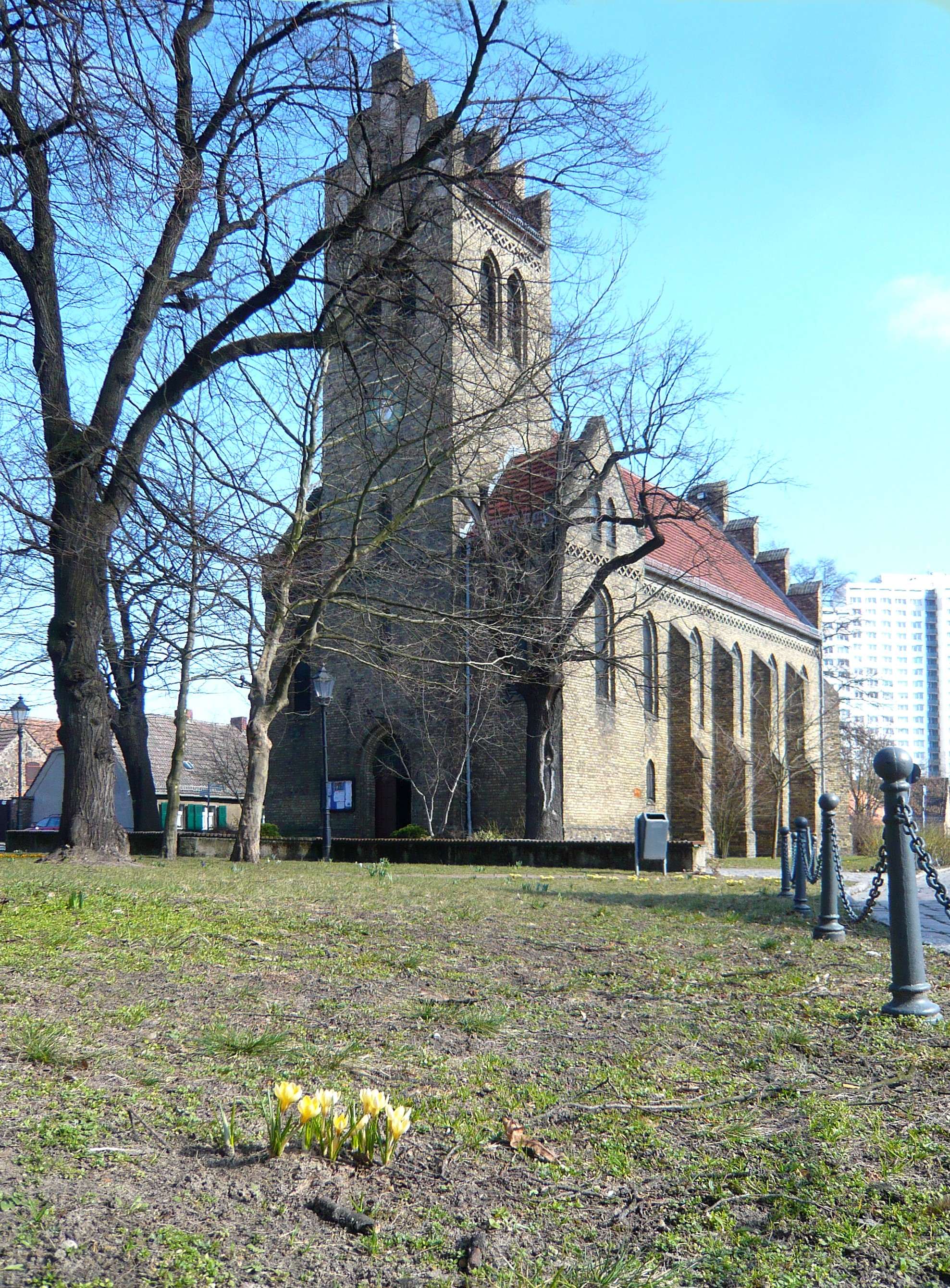 Ortsteil Marzahn, ev. Dorfkirche